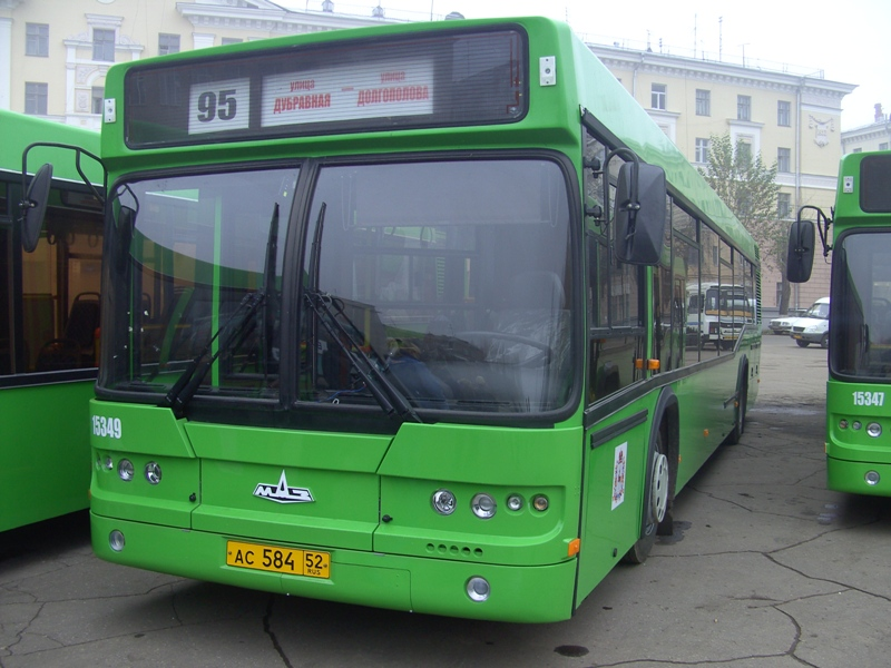 Автобус МАЗ-103 производства нижегородского завода Самотлор-НН в Нижнем Новгороде